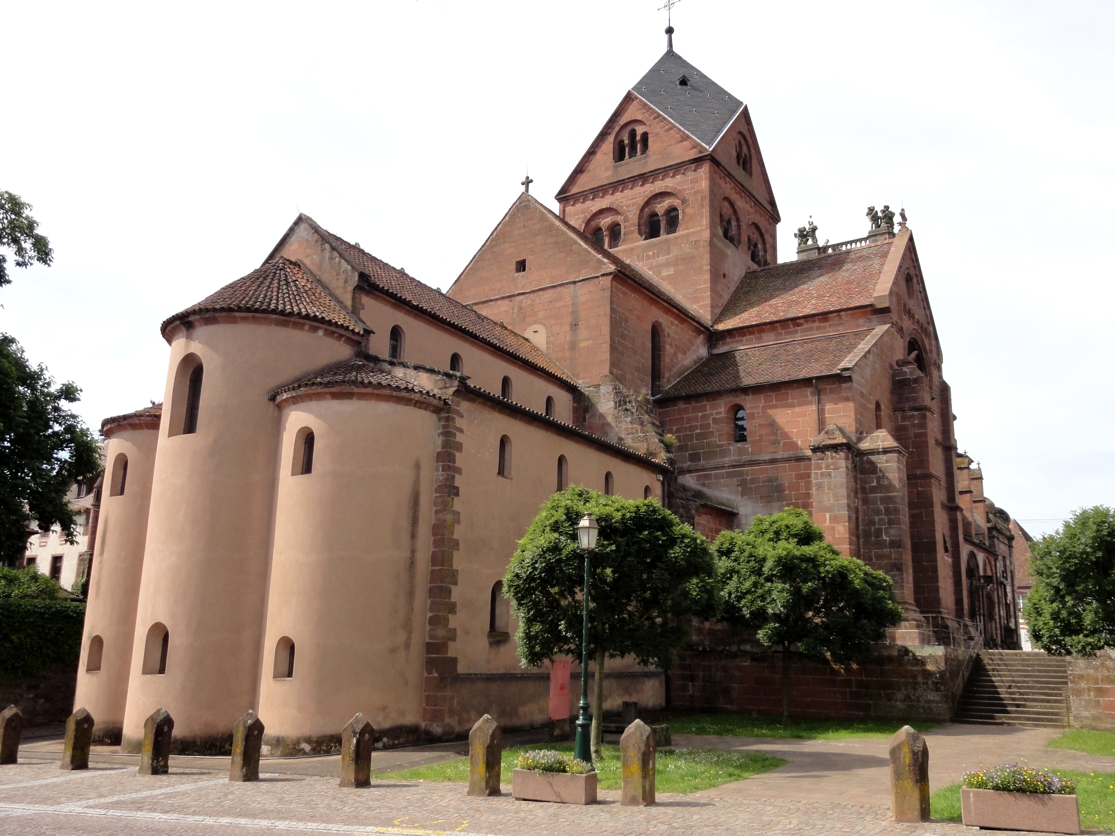 Alsace, Bas-Rhin, Neuwiller-lès-Saverne, Église abbatiale Saints-Pierre et Paul (PA00084820, IA67009917): Vue sur le chevet et les absides semi-circulaires à deux niveaux, correspondant aux chapelles Ste-Catherine (bas) et St-Sébastien (haut).